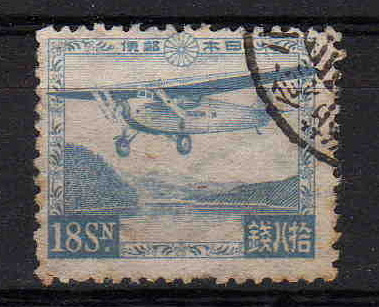 japanese stamp（日本の航空切手）描かれているのは富士山とフォッカー7型3M旅客機である。